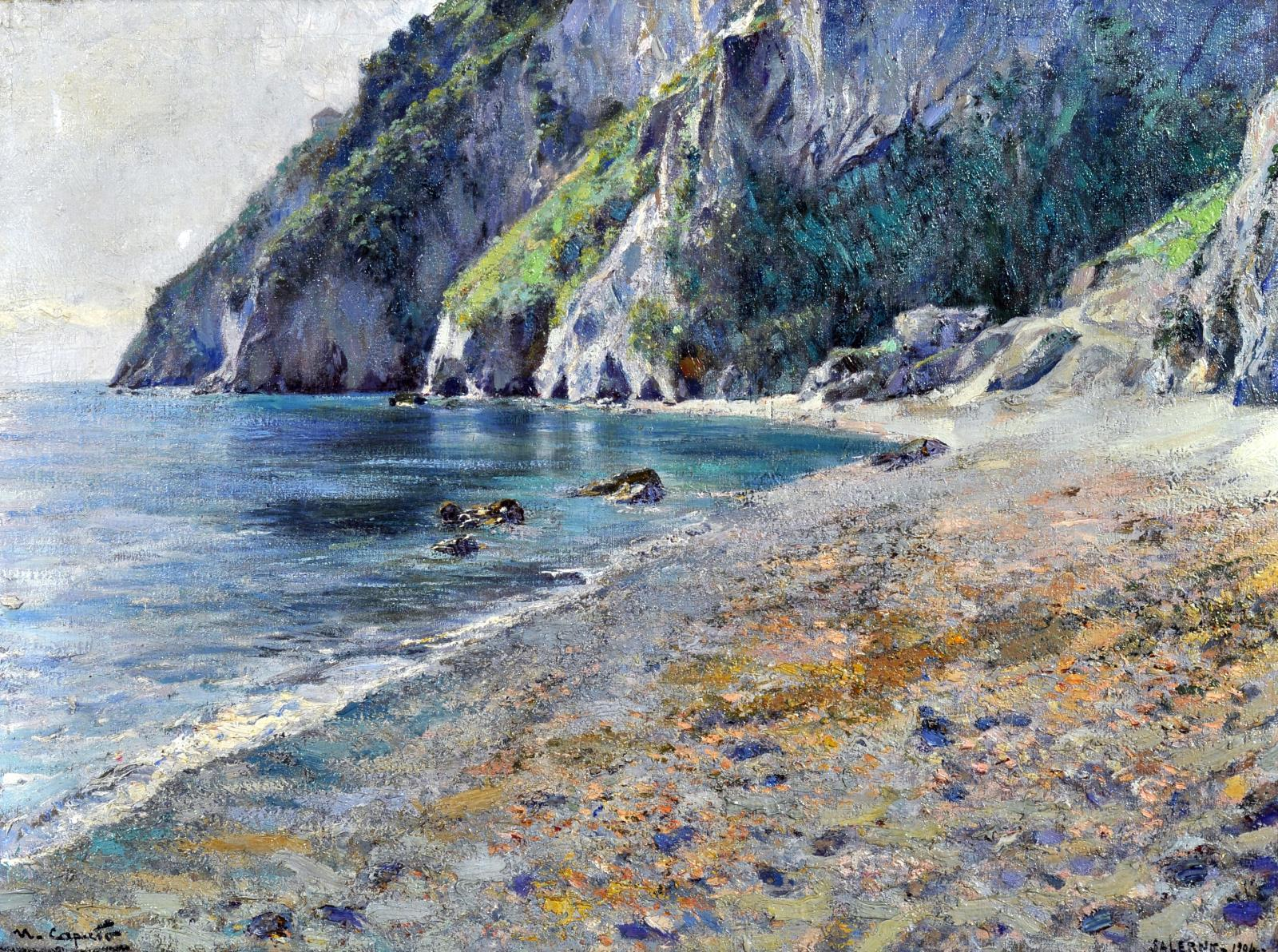 oil on canvasmedium QS:P186,Q296955;P186,Q4259259,P518,Q861259